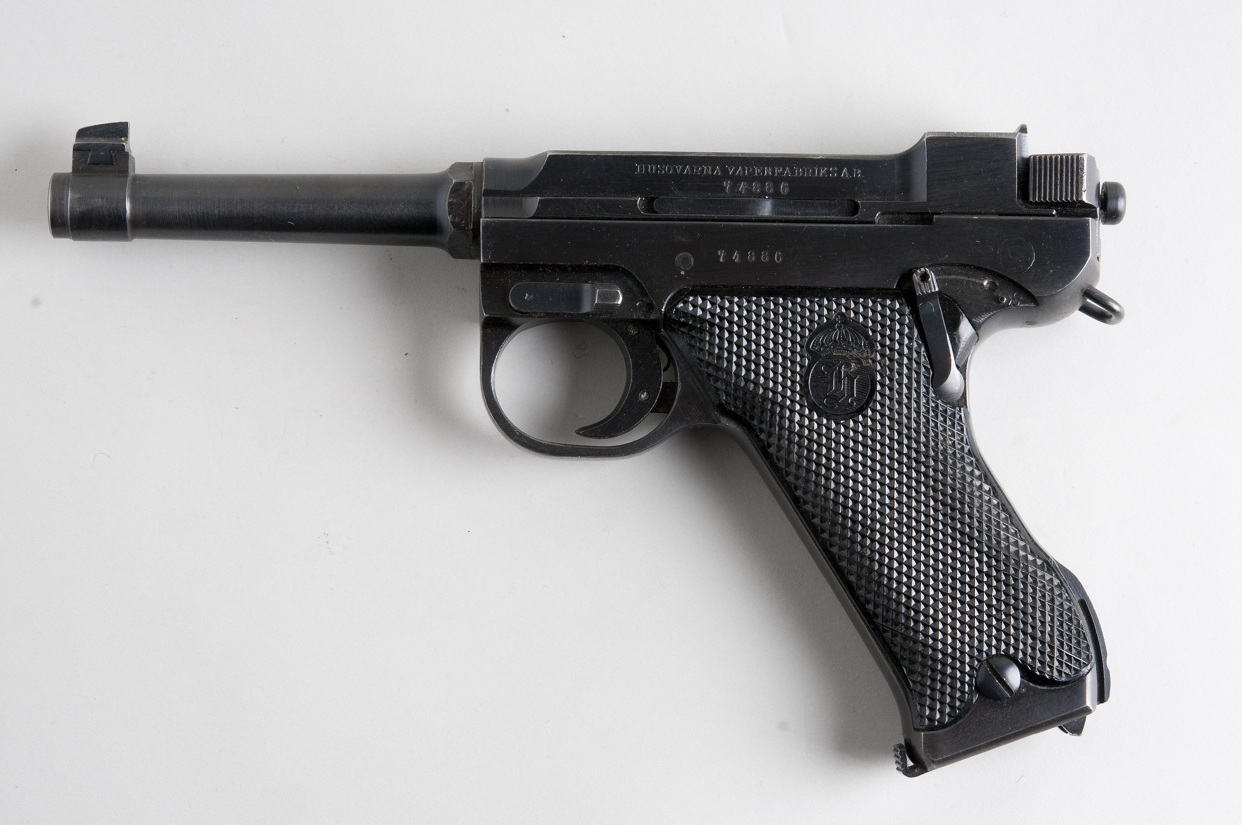 Husqvarna 40 From flickr user handvapensamlingen - Pistols used in Norway.